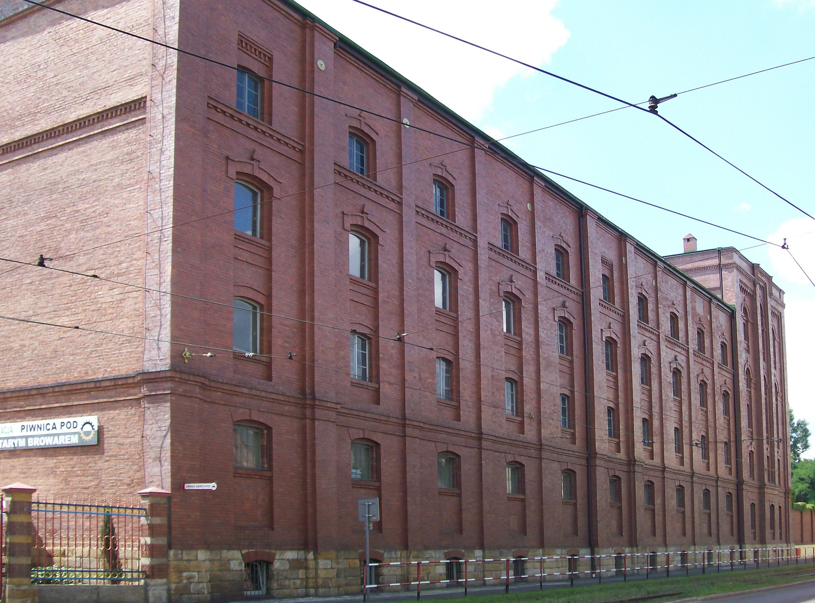 Zabudowania browaru braci Mokrskich Katowice, ul. ks. bpa H. Bednorza 2a-6, Katowice 11.19.